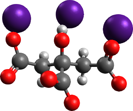 檸檬酸銫 球-棍 模型